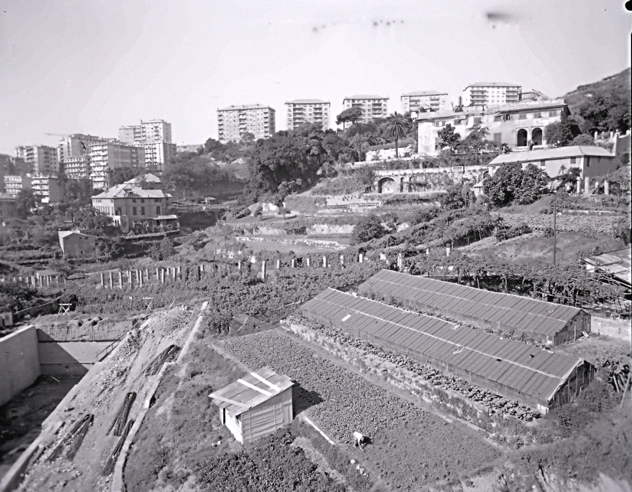 Riviera di Ponente. Genova. Cornigliano. Ville immerse nel verde. Veduta generale. →This file has been extracted from another file: Paolo Monti - Servizio fotografico (Genova, 1963) - BEIC 6362142.jpg Modifiche effettuate. livelli e leggero crop. Servizio fotografico : Genova, 1963 / Paolo Monti. - Buste: 10, Fototipi: 10 : Negativo b/n, gelatina bromuro d'argento/ pellicola ; 10x12. - ((Serie costituita da 10 buste sciolte di negativi identificati con i nn.: 7342, 7343, 7344, 7348, 7349, 7350, 7351, 7352, 7353, 7357. - Su agenda denominata "R 1 - Monti/ 1 aprile 1963 - 6 giugno 1964/ 6000-8193" in corrispondenza dell'indicazione della suddetta serie appunto manoscritto: "Villa modificata con due corpi laterali aggiunti". - Possibili sottoserie:. - 7342-7343:. - 7348-7349. - Il negativo identificato con il numero 46397 è stato realizzato per Zodiac. - Occasione: Documentazione per la pubblicazione: Italia Nostra (a cura di), "Le ville genovesi", catalogo della mostra, Genova 1962, Genova, Comune di Genova, 1967. - Fonte: Rubrica di Paolo Monti: Archivio fino 1-4-1961/ 31-3-1963 (1961-1963), presso Archivio Paolo Monti. - Fonte: Agenda di Paolo Monti: R 1 - Monti/ 1 aprile 1963 - 6 giugno 1964/ 6000-8193 (1963-1964), presso Archivio Paolo Monti. - Fonte: Monografia di Italia Nostra (a cura di): Le ville genovesi, catalogo della mostra, Genova 1962, Genova, Comune di Genova (1967). - Fonte: Lettera di Paolo Monti: I. Carteggi/ Genova - Enrico (1963-1966), presso Archivio Paolo Monti. Camicia con documenti dattiloscritti e manoscritti vari relativi al lavoro eseguito per Italia Nostra: preventivi, lettere, inventari.